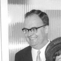 Links der Dekan der medizinischen Fakultät der Christian-Albrechts-Universität (CAU) Prof. Dr. Dr. Johann Schaeuble, in der Mitte der Kieler Medizinhistoriker Prof. Dr. Fridolf Kudlien, rechts Noël Poynter und seine Ehefrau.